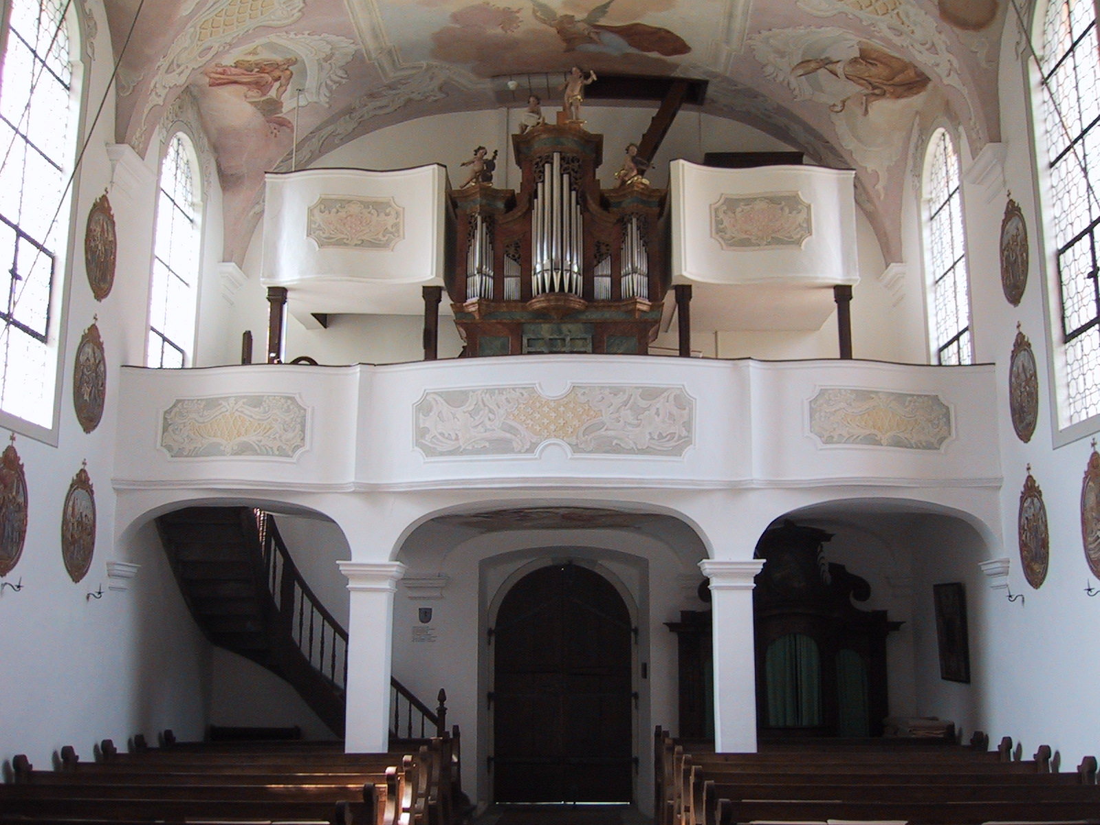 Schlosskapelle Mammern, hinterer Innenraum mit Orgel